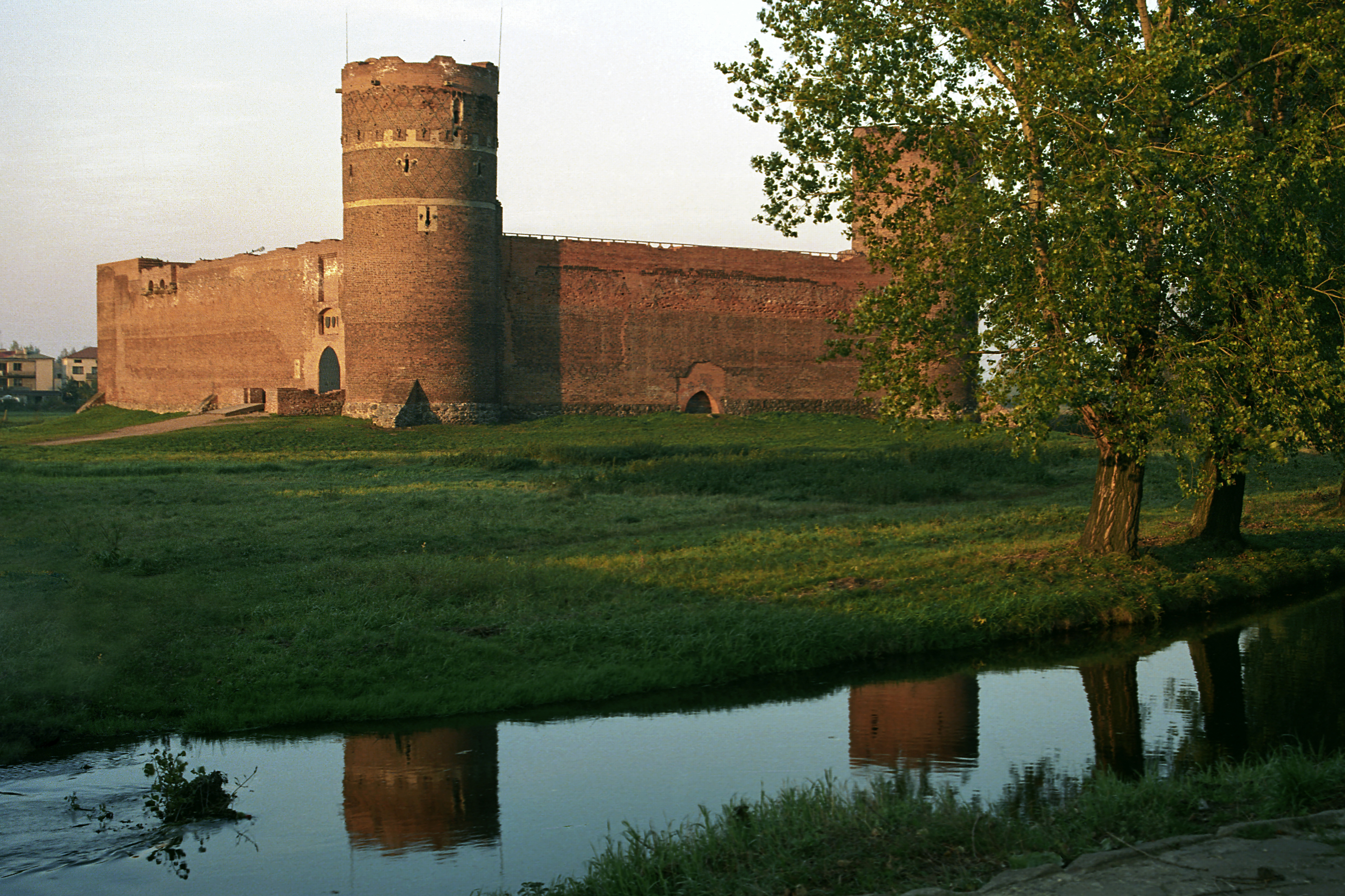 Ciechanów